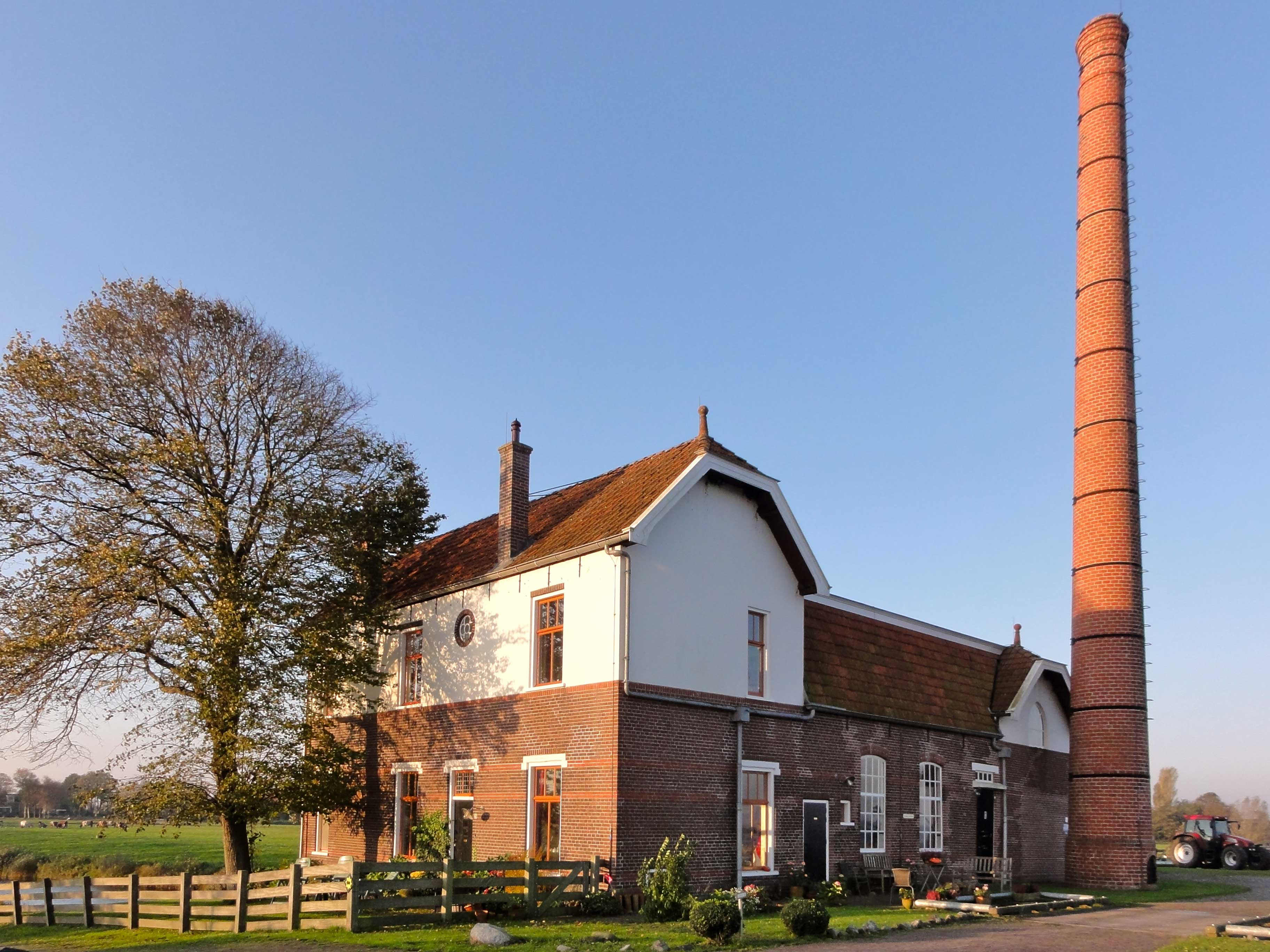 Gemaal van Echten (noordzijde en oostzijde)